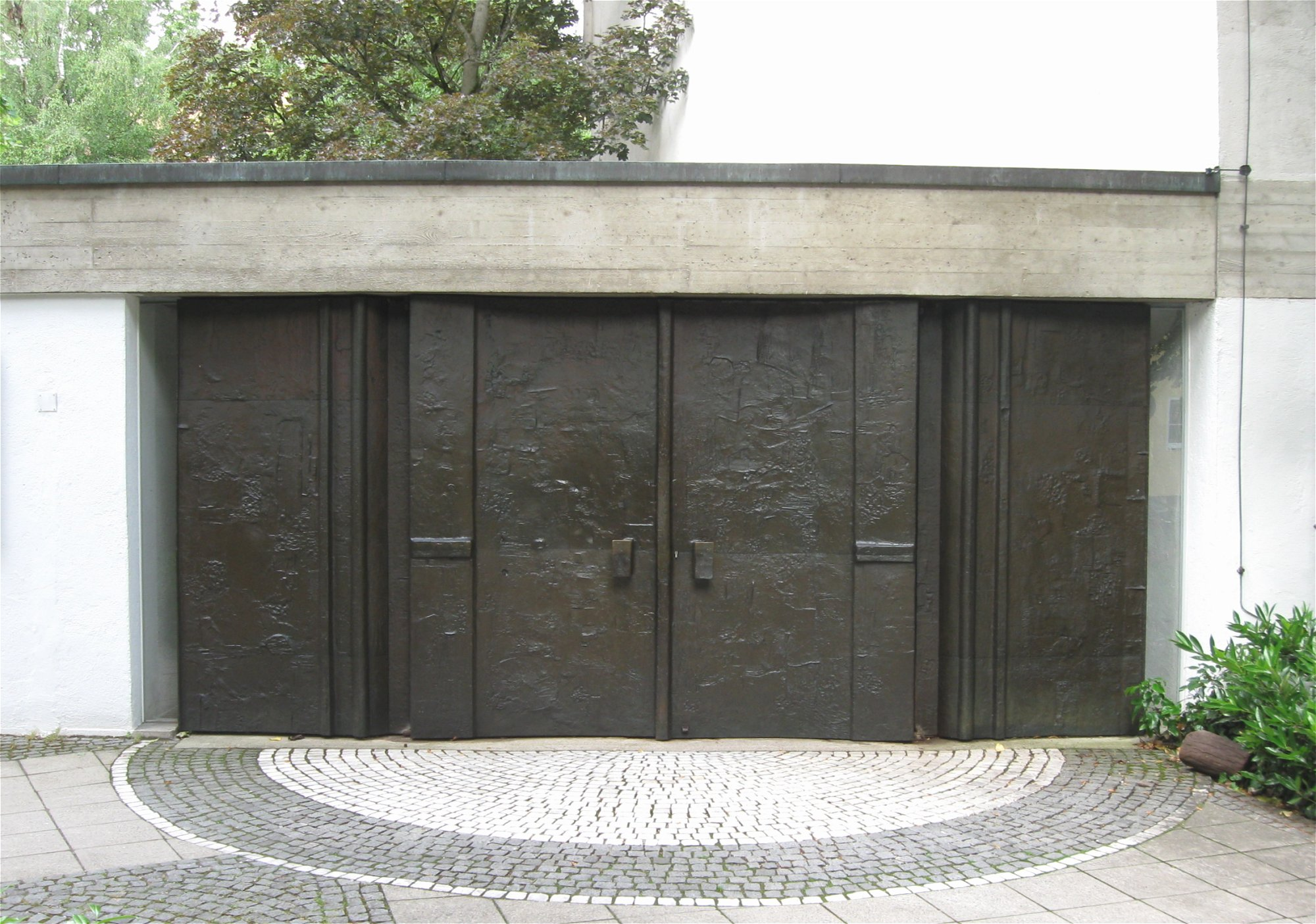 Kreuzkirche in München-Schwabing, Eingang